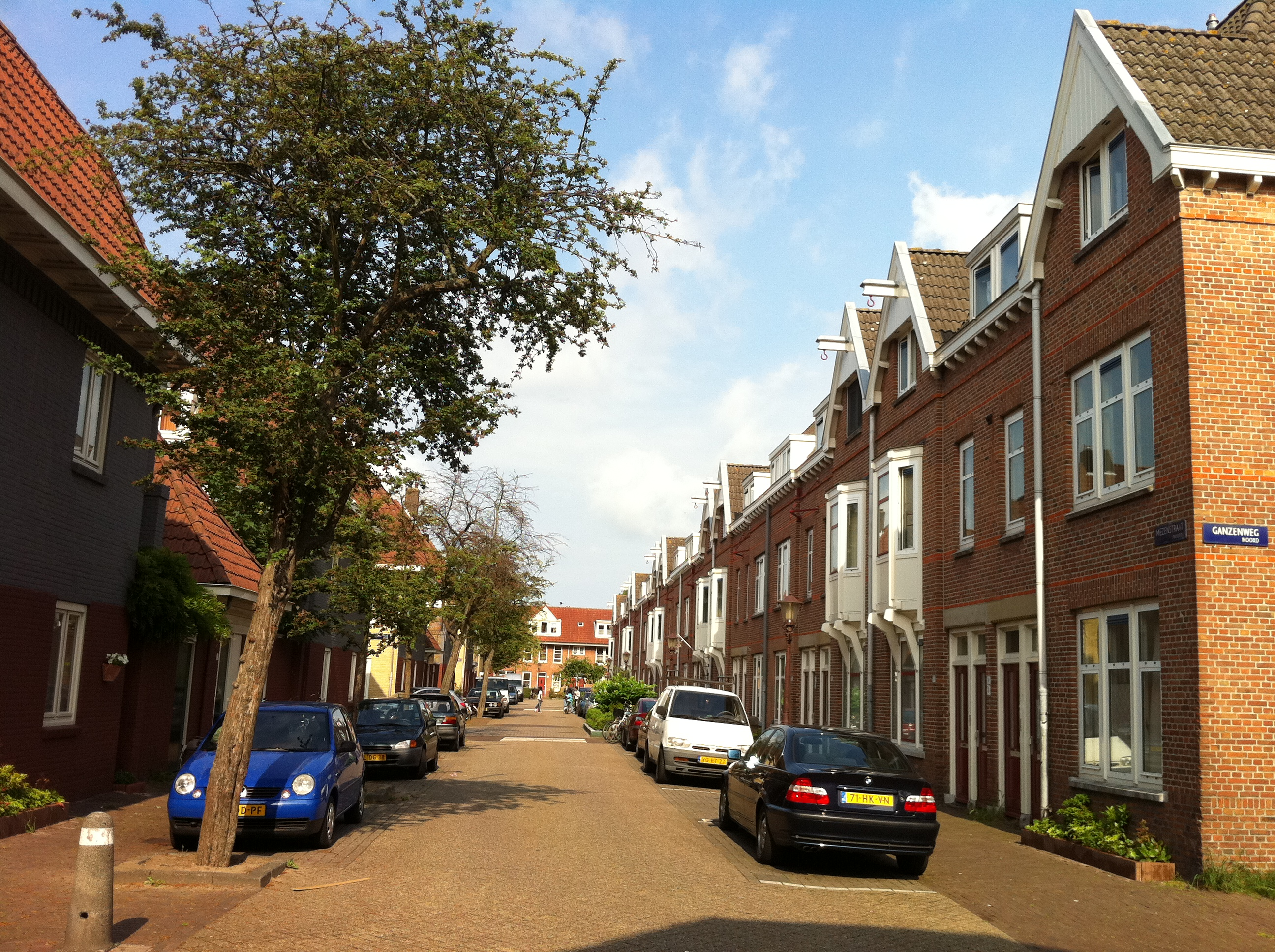 Amsterdam noord arbeiderswoningen gebouwd in 1921, rechts woningblok van Maatschappij tot Huizenbouw benoorden het IJ NV